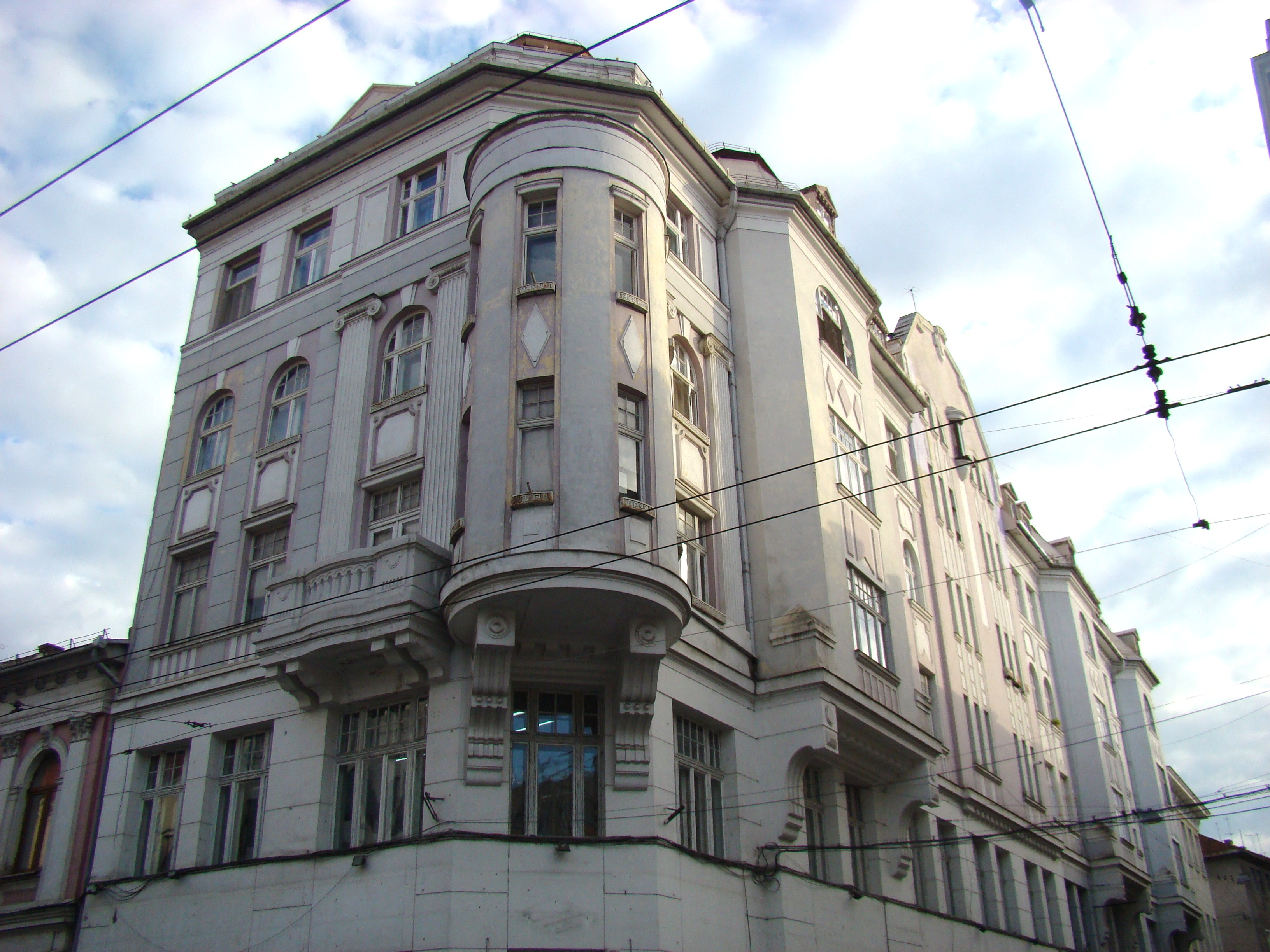 Clădire monument istoric, str.Emile Zola, nr.1